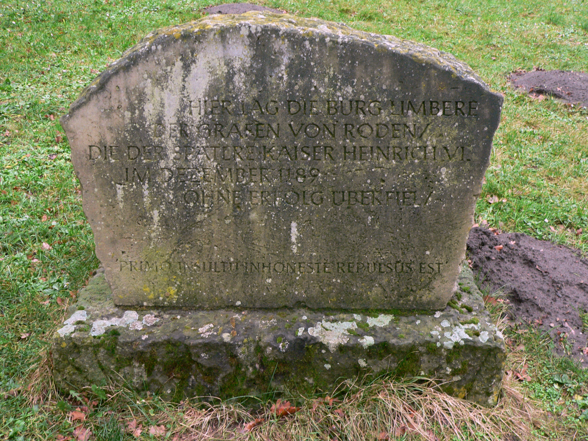 Gedenkstein für die Burg Limmer an der St.-Nikolai-Kirche (Limmer) mit der Aufschrift "Hier lag die Burg Limbere der Grafen von Roden/die der spätere Kaiser Heinrich VI. im Dezember 1189 ohne Erfolg überfiel